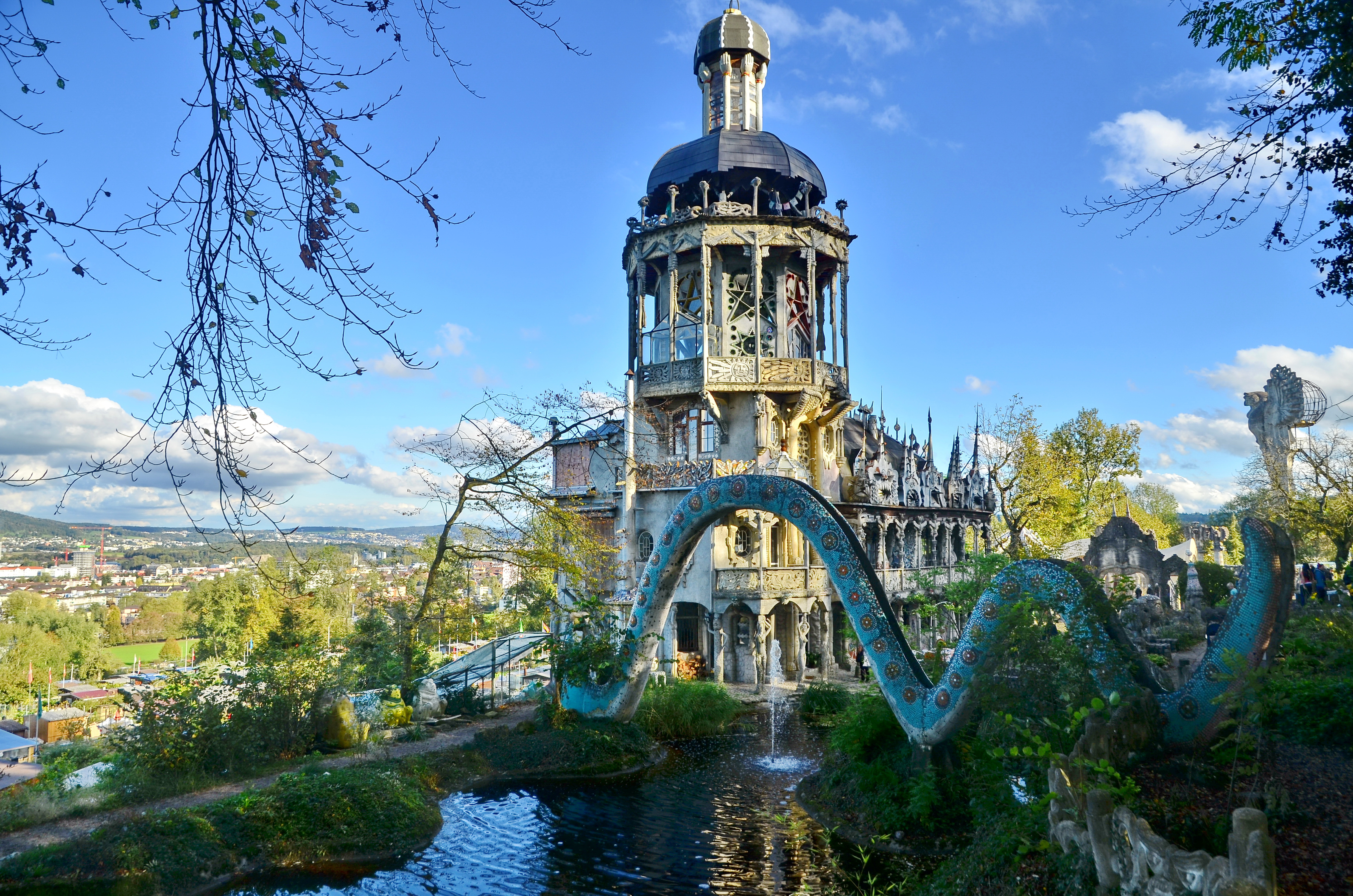 Bruno Weber Park, Limmat valley in the background nearby Dietikon - Spreitenbach (Switzerland)